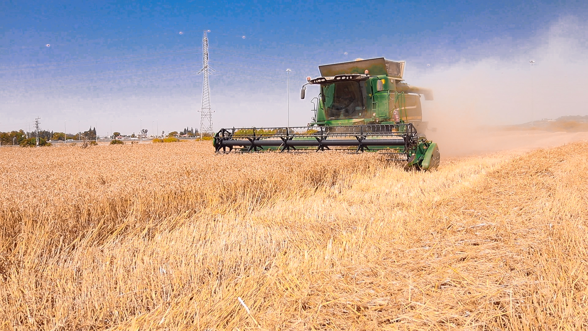 קומביין תבואות קוצר חטים. 2019